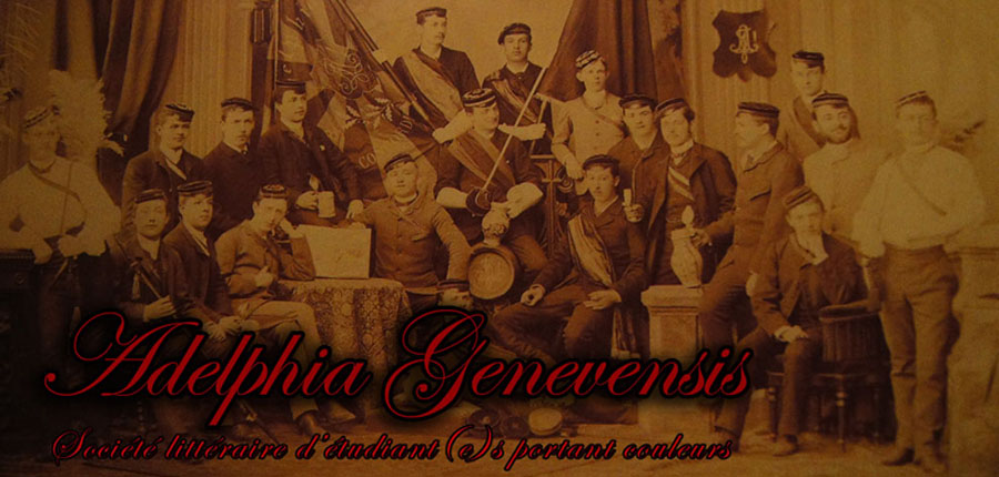 Adelphia Genvensis, société d'étudiants portant couleurs depuis 1878